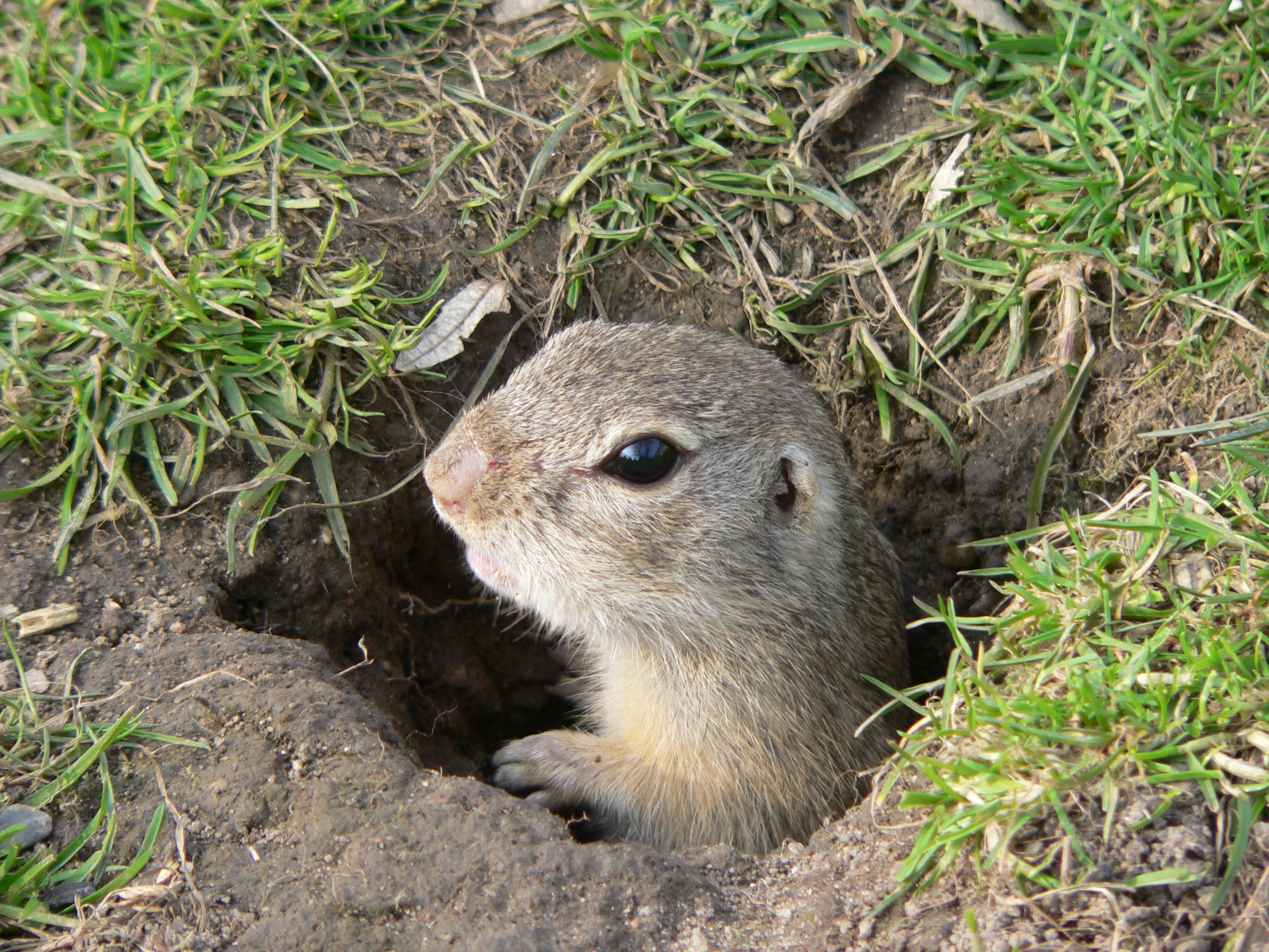 Europäischer Ziesel (Spermophilus citellus), aus einem Erdloch guckend